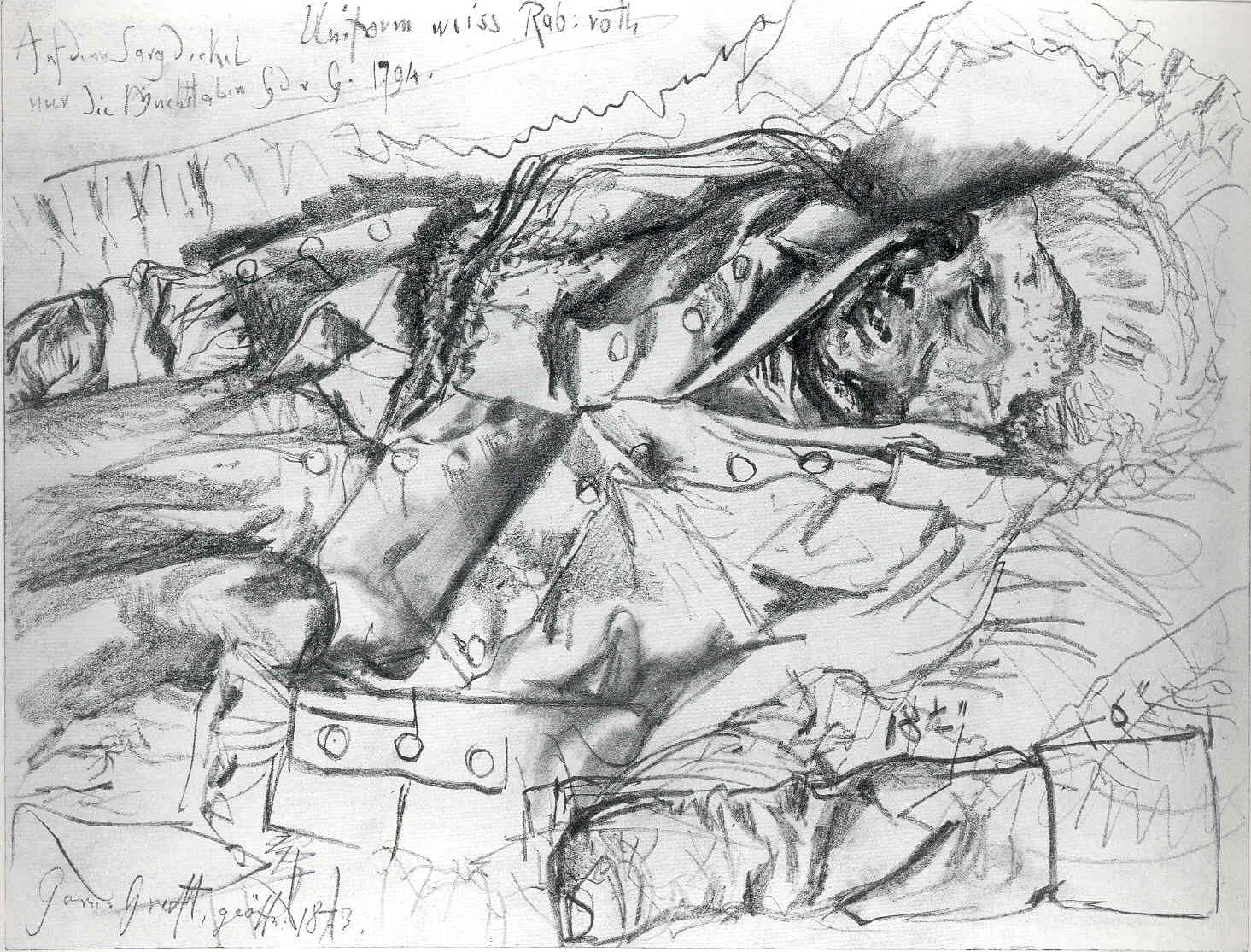 Leiche eines Offiziers. Bleistift, 23,8×33,3 cm. Berlin, Kupferstichkabinett (SZ Menzel N 253). Identifiziert als Georg Dietrich von der Groeben.